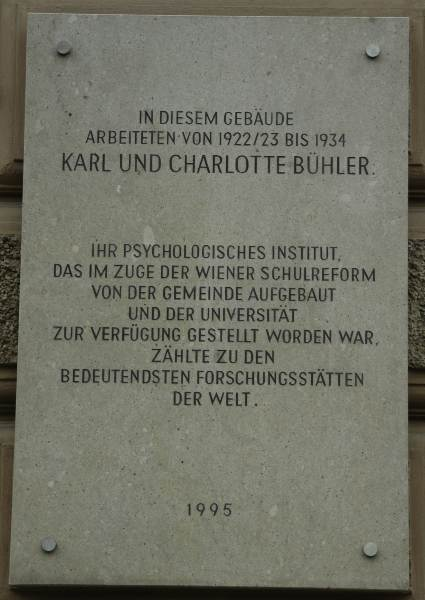 Gedenktafel für Kinderpsychologen Bühler am Palais Epstein in Wien